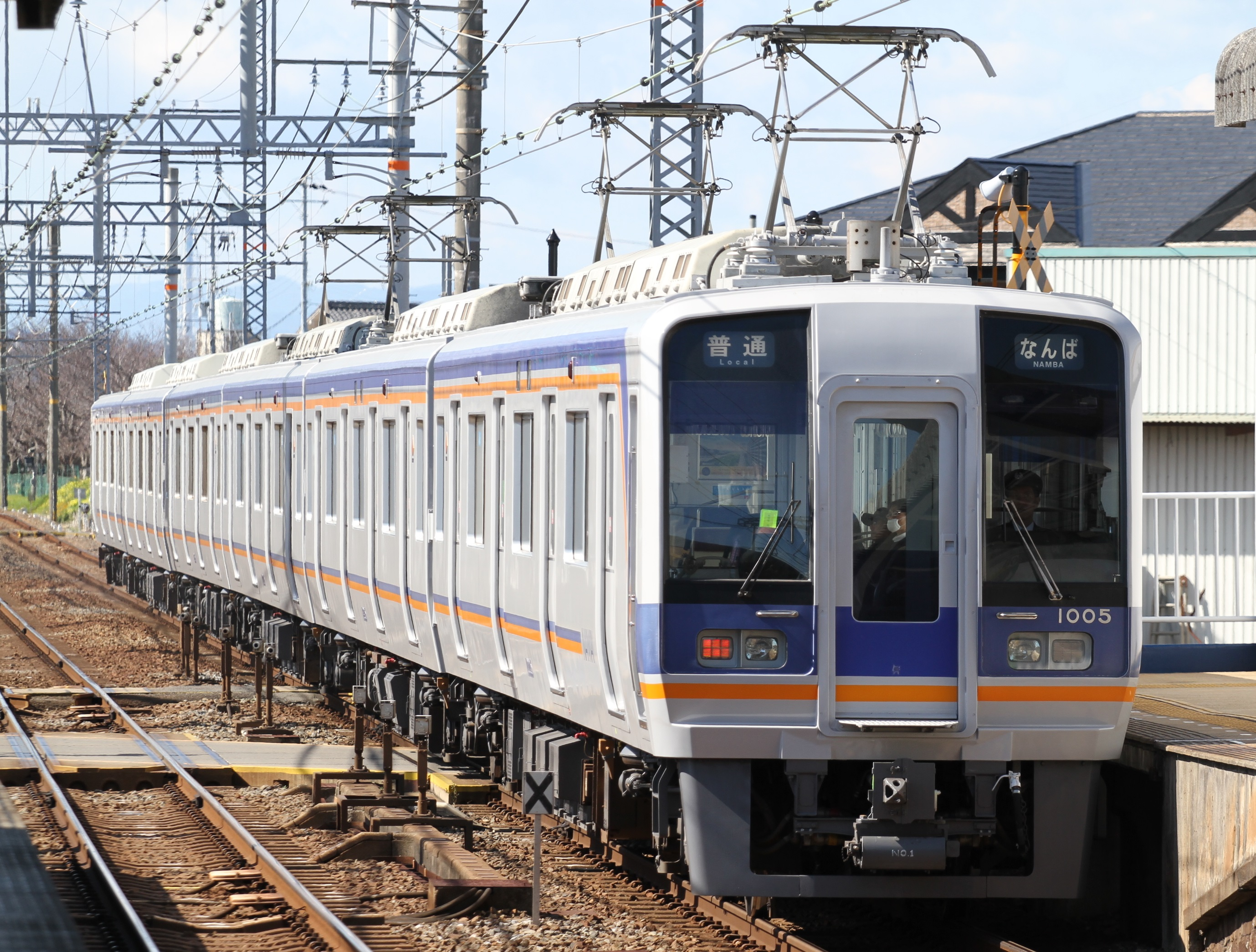 南海1000系（2代目）1005編成